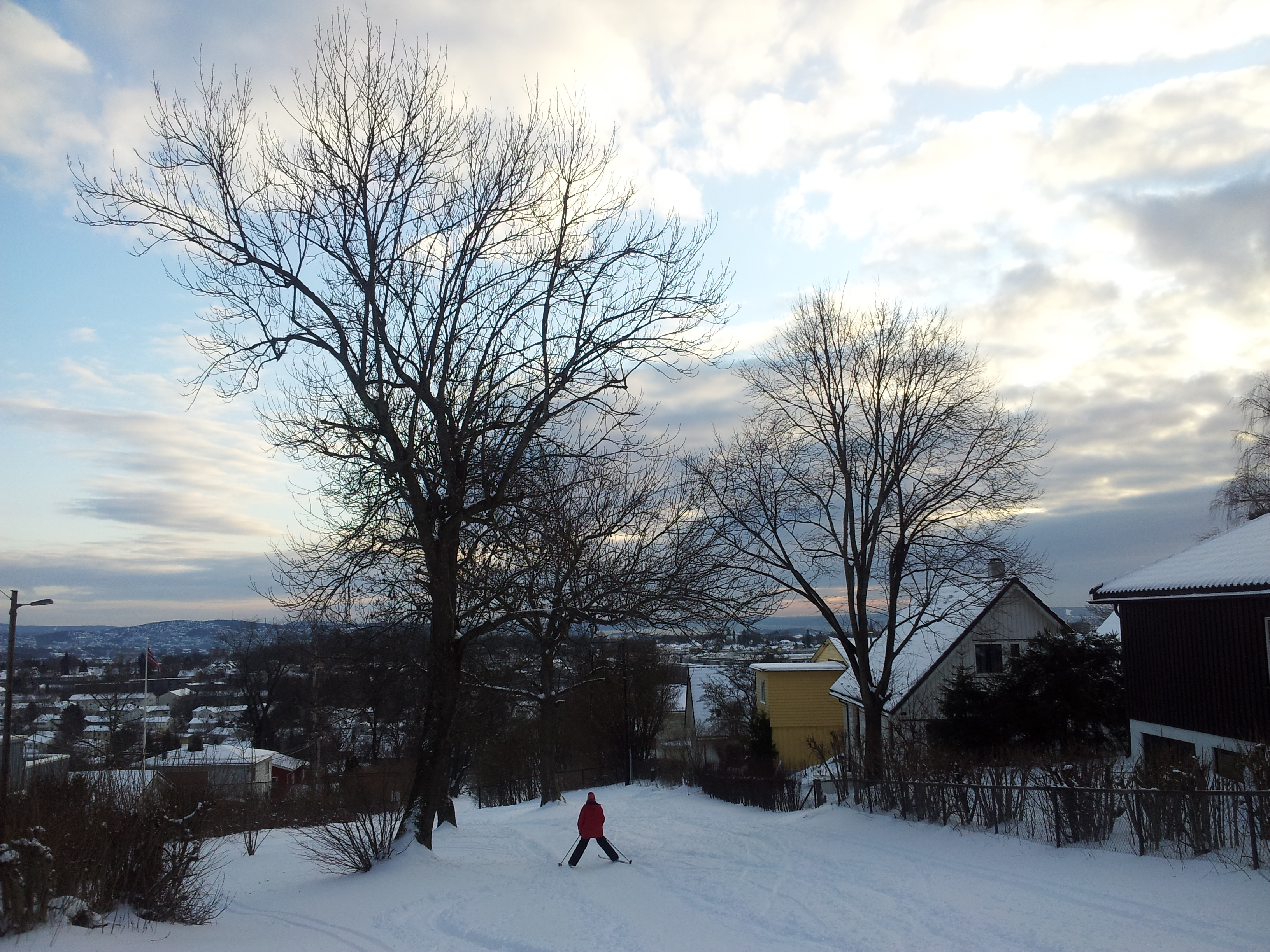 Damefallet om vinteren, 2012.